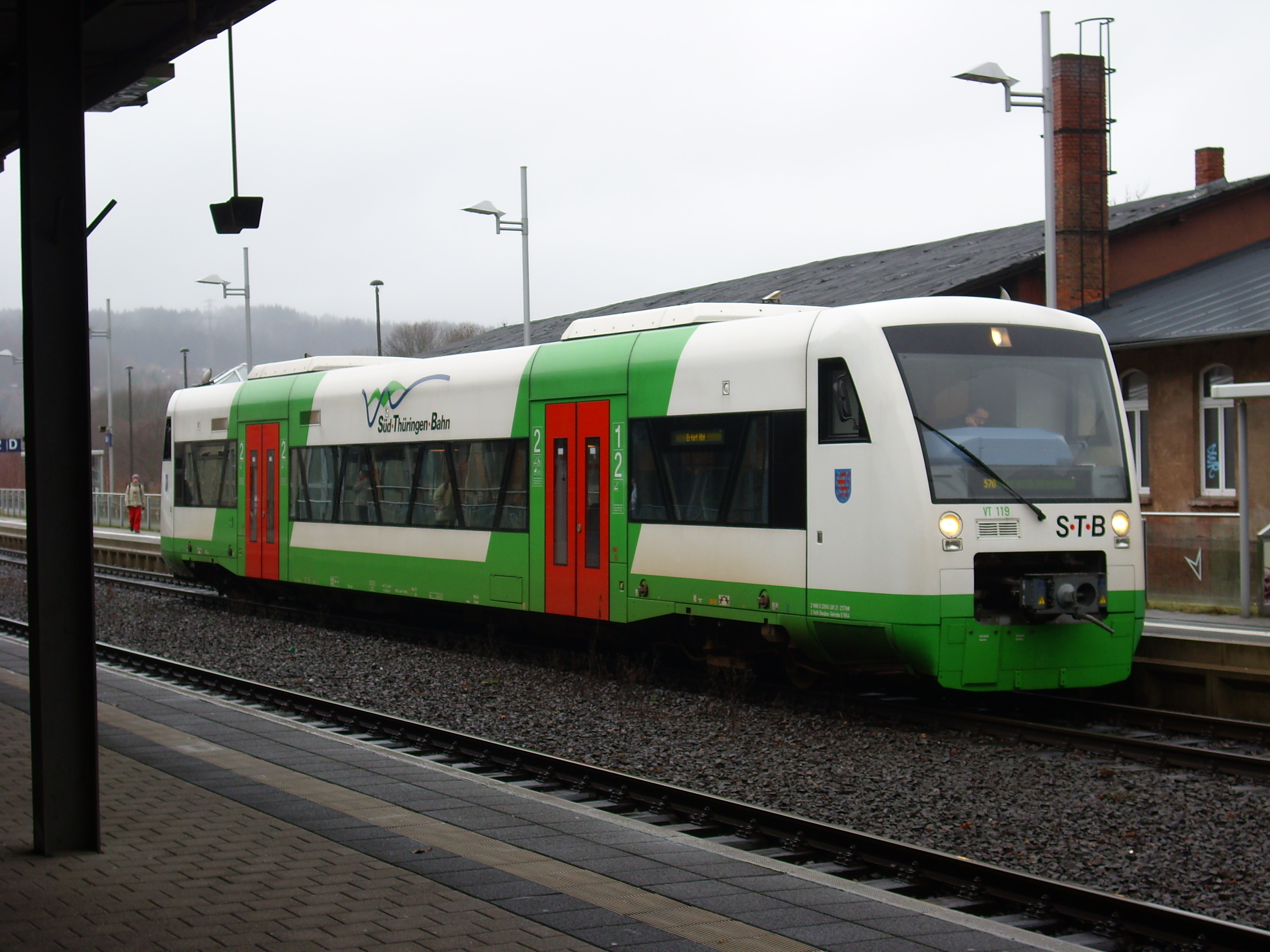 Ein Regioshuttle (VT 650) der SüdThüringenBahn (STB) aus Meiningen nach Erfurt Hbf im Bahnhof Suhl.